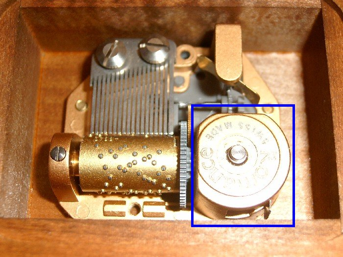 Spieldose - Federhaus mit blauer Farbe umrandet